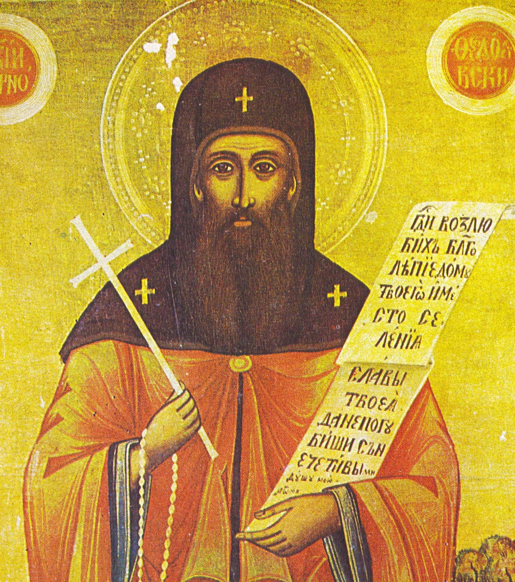 Икона XIX века. Болгария.